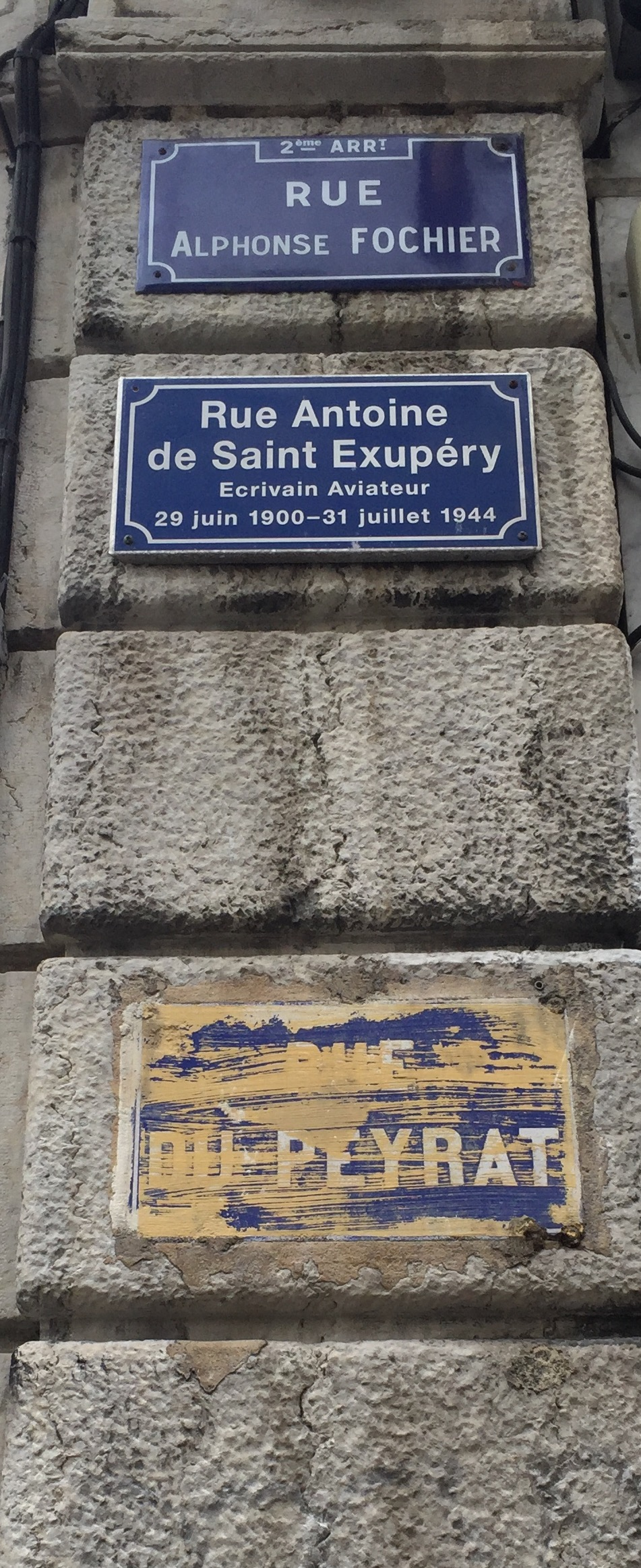 Plusieurs plaques de rue à Lyon.